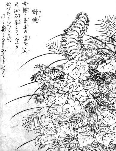 Nozuchi (野槌, a legendary serpentine monster) from the Konjaku Gazu Zoku Hyakki (今昔画図続百鬼)